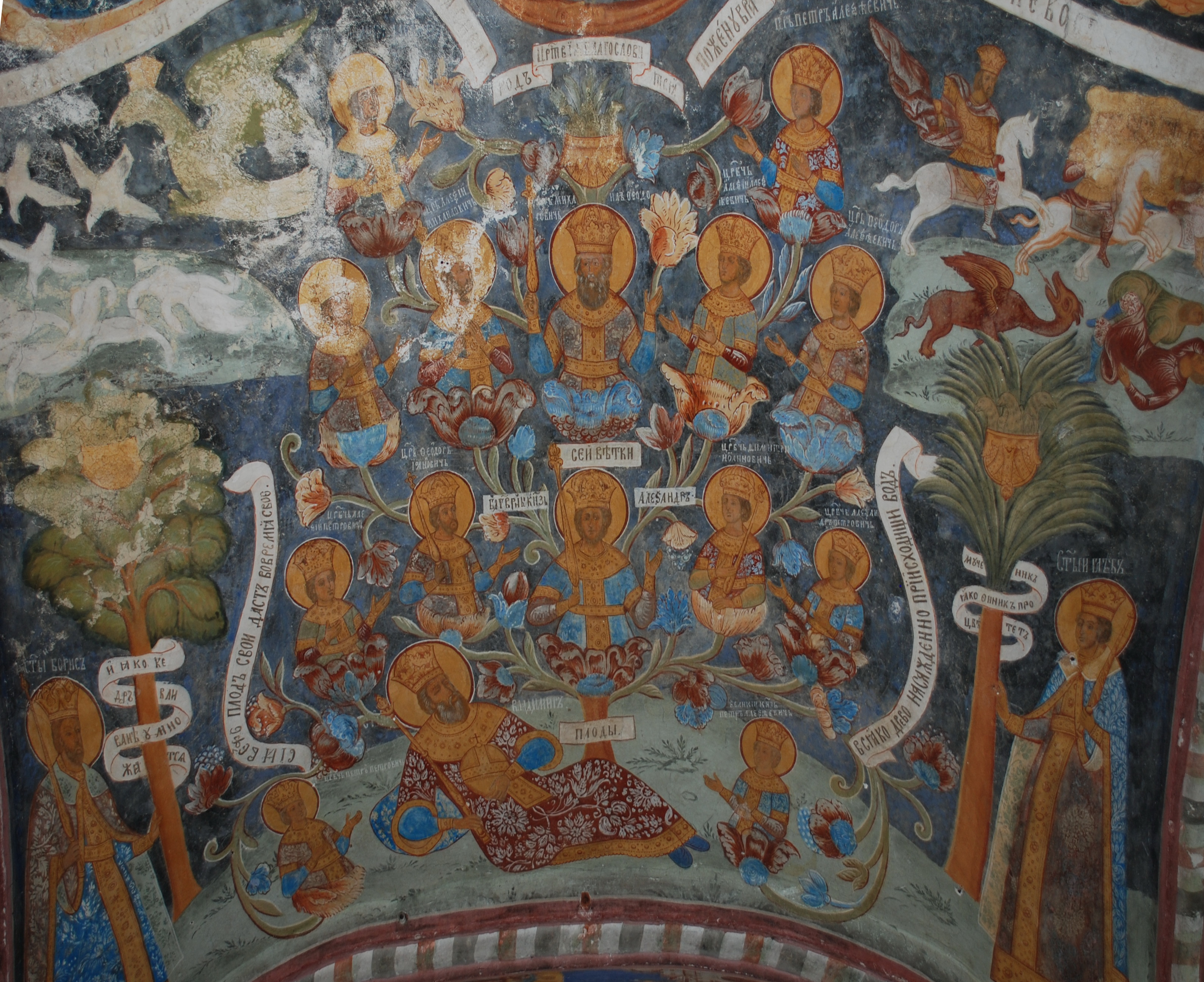 Комплекс церкви Ильи Пророка (Ярославская область, Ярославль, Советская площадь)